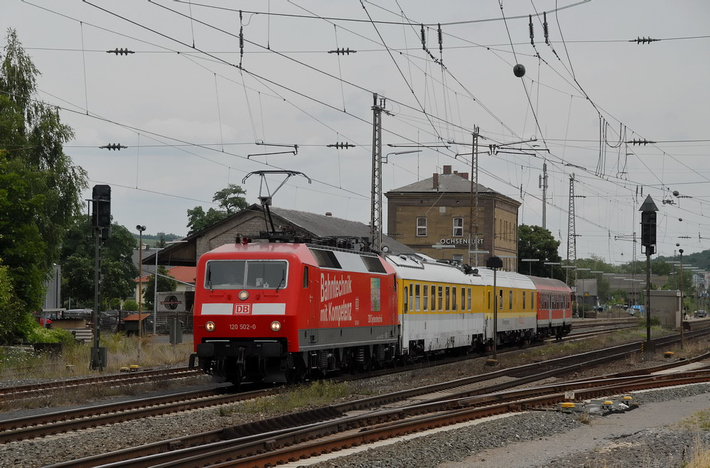 120 502 mit Fahrweg-Messzug in Ochsenfurt